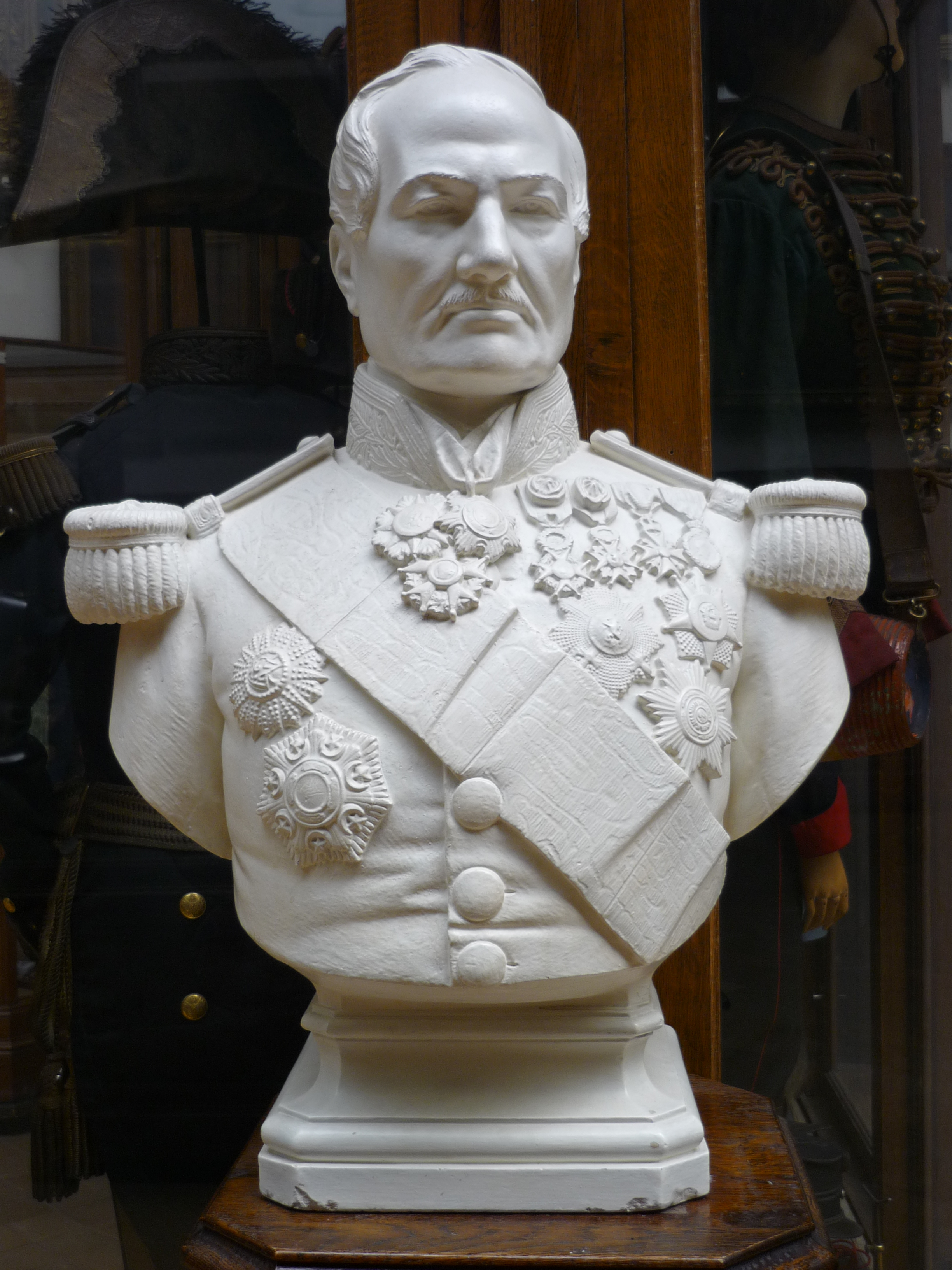 Buste de Jean Chapelié, Musée du Cinquantenaire, Bruxelles, Belgique. Royal Museums of Art and History Native nameMusées royaux d’art et d’histoireLocationBrusselsCoordinates50° 50′ 25.85″ N, 4° 23′ 35.37″ E Established1835Web page control : Q945059 VIAF: 147671754 ISNI: 0000 0001 2342 957X GND: 1006854-5 SUDOC: 162391722 institution QS:P195,Q945059